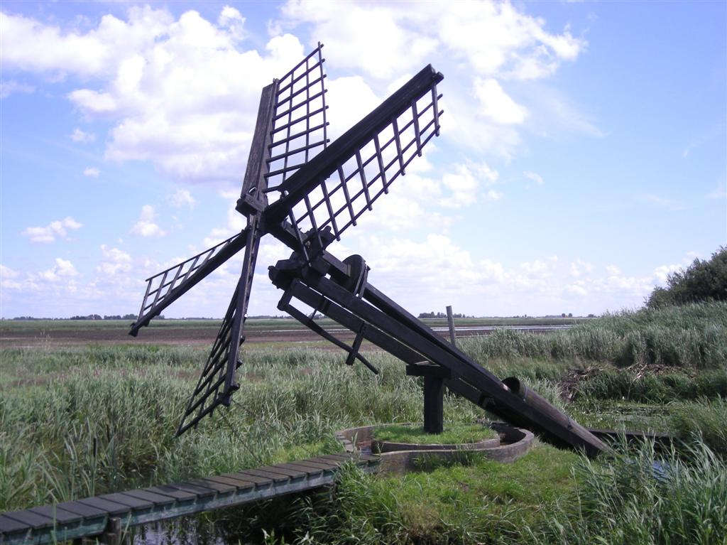 Tjasker Sanpoel, windmolen bij Wijckel. Friesland